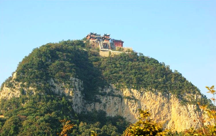 Yuntai mountain